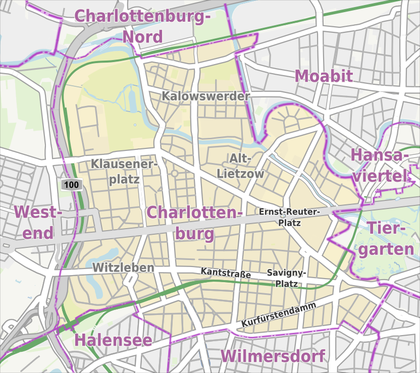 Übersichtskarte der Straßen und Ortslagen in Berlin-Charlottenburg